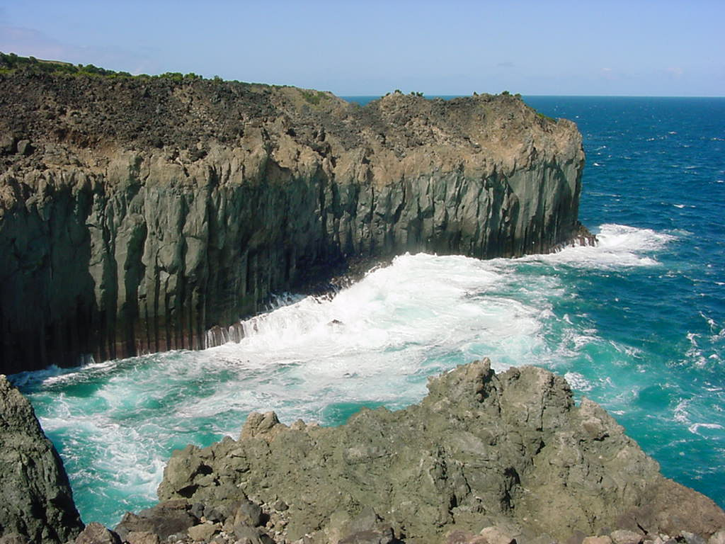 Rochedos da Reserva Natural da Alagoa da Fajãzinha, ilha Terceira, Açores, Portugal.